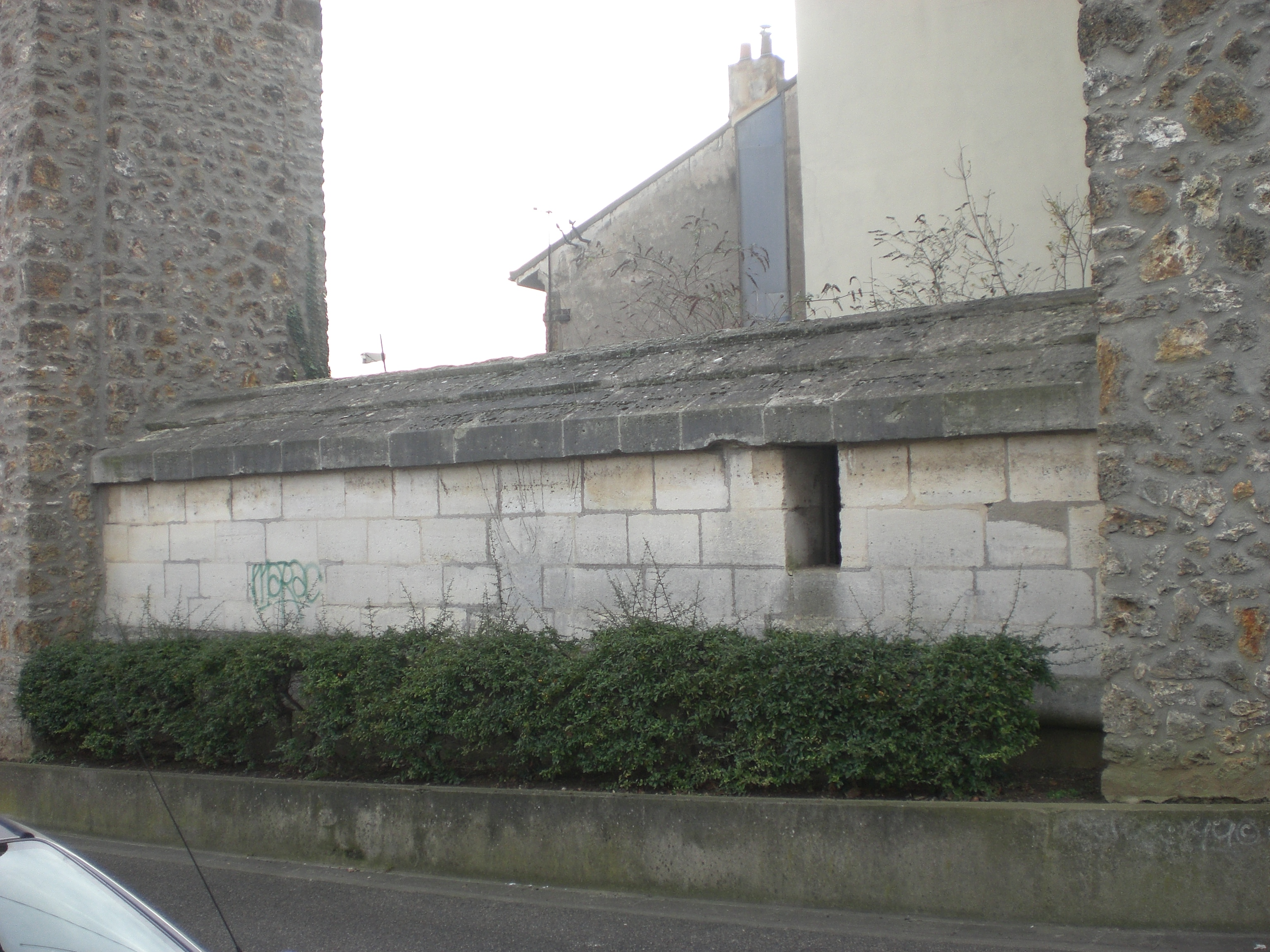 Arcueil, France liaison entre acqueduc Medicis et Belgrand